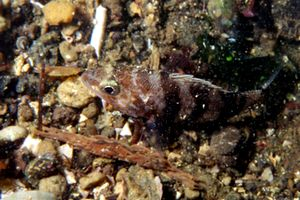 Serranus hepatus